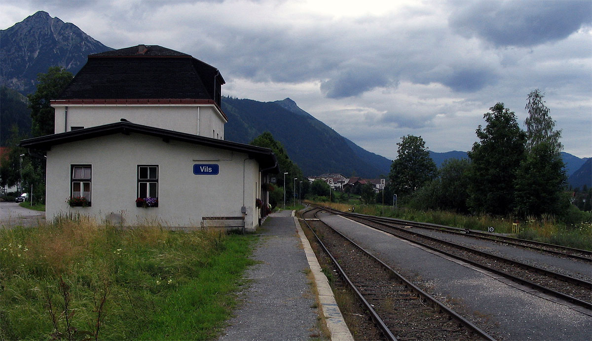 Bahnhof Vils der Außerfernbahn, im Hintergrund links das Brentenjoch (2000 m)